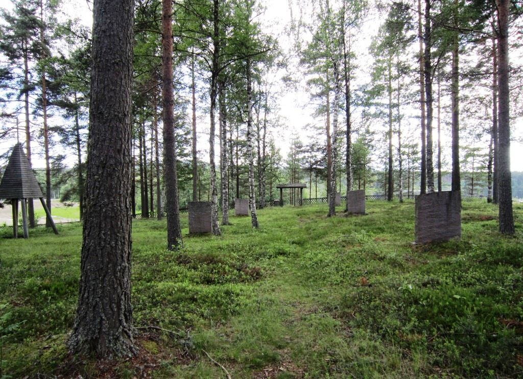 Nordre gravlund (Åsnes Finnskog)